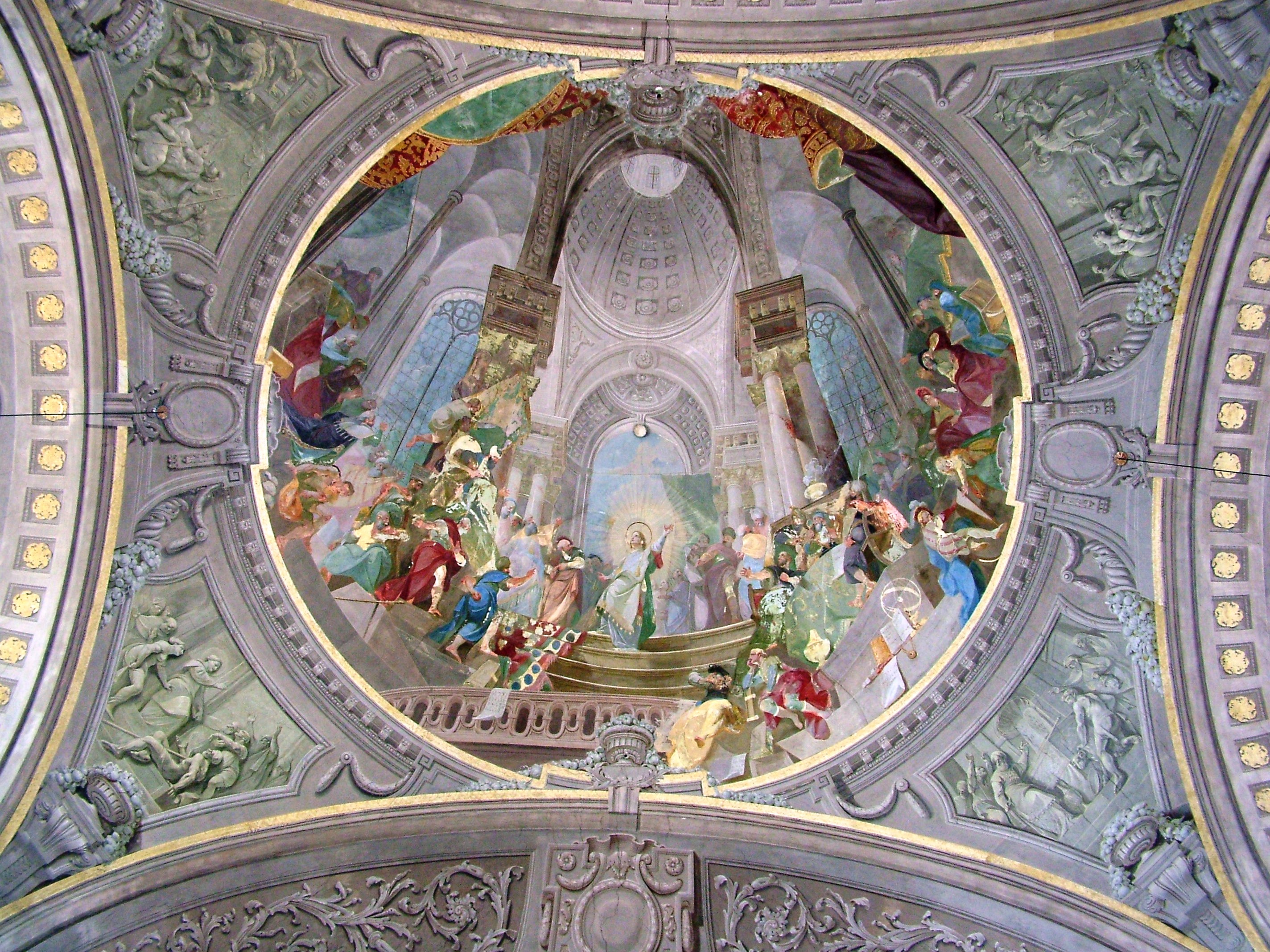 Maulbertsch-freskó a pápai nagytemplomban